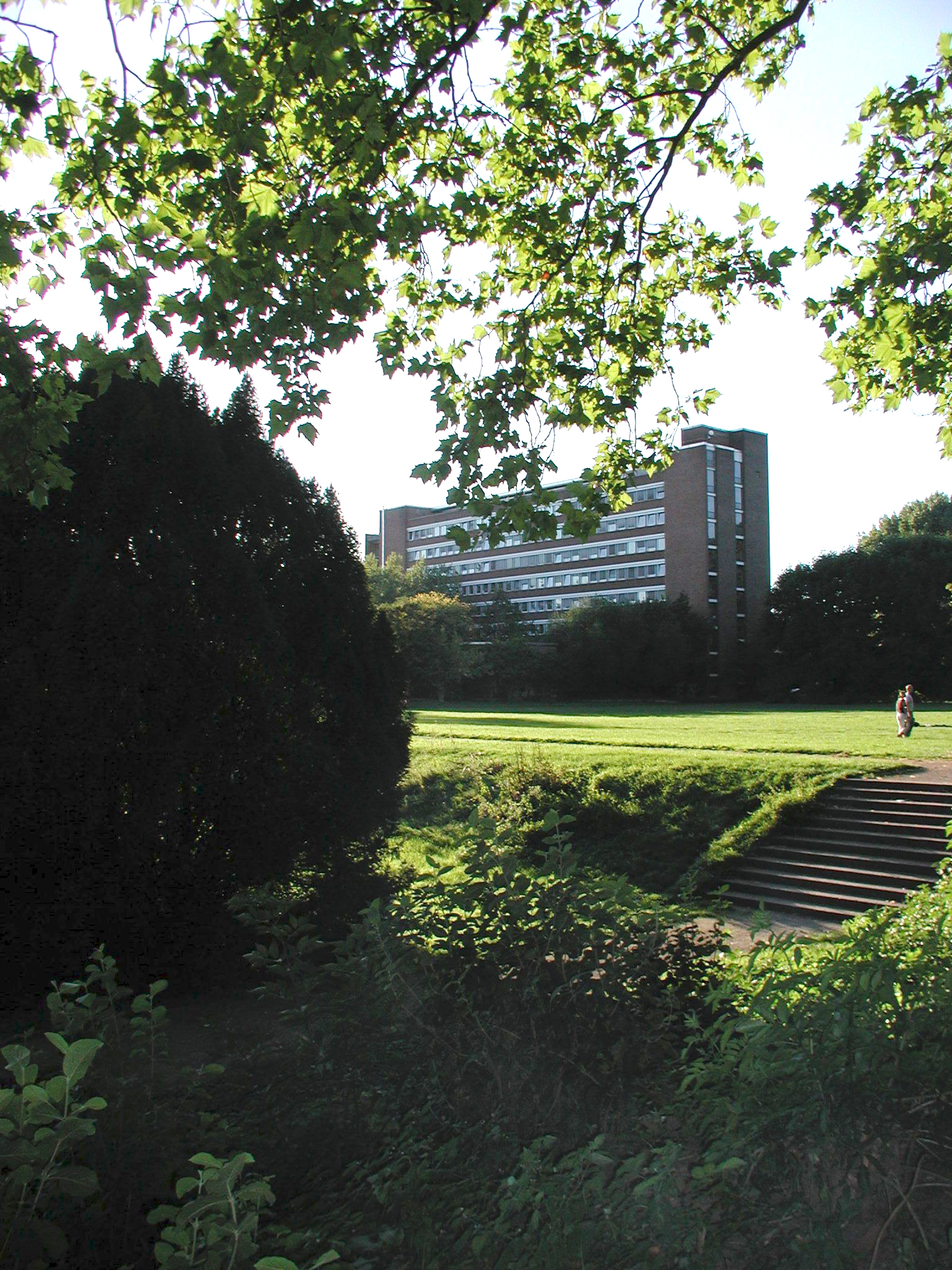 Köln - Rund um die Universität. WiSo-Gebäude